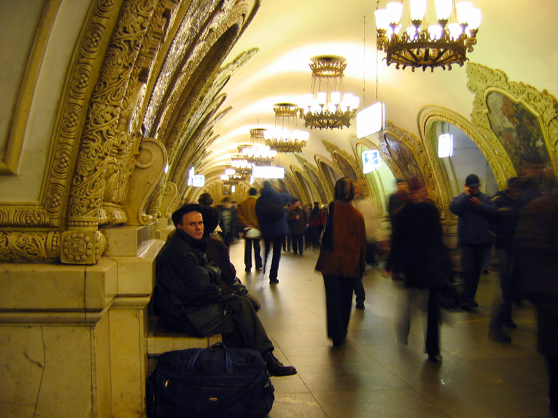 Metrostation Kievskaya. Voor nog heel veel meer foto's uit Moskou: Moskou januari 2004